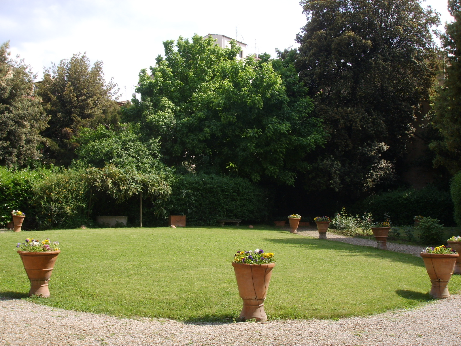 Paalzzo pandolfini, giardino